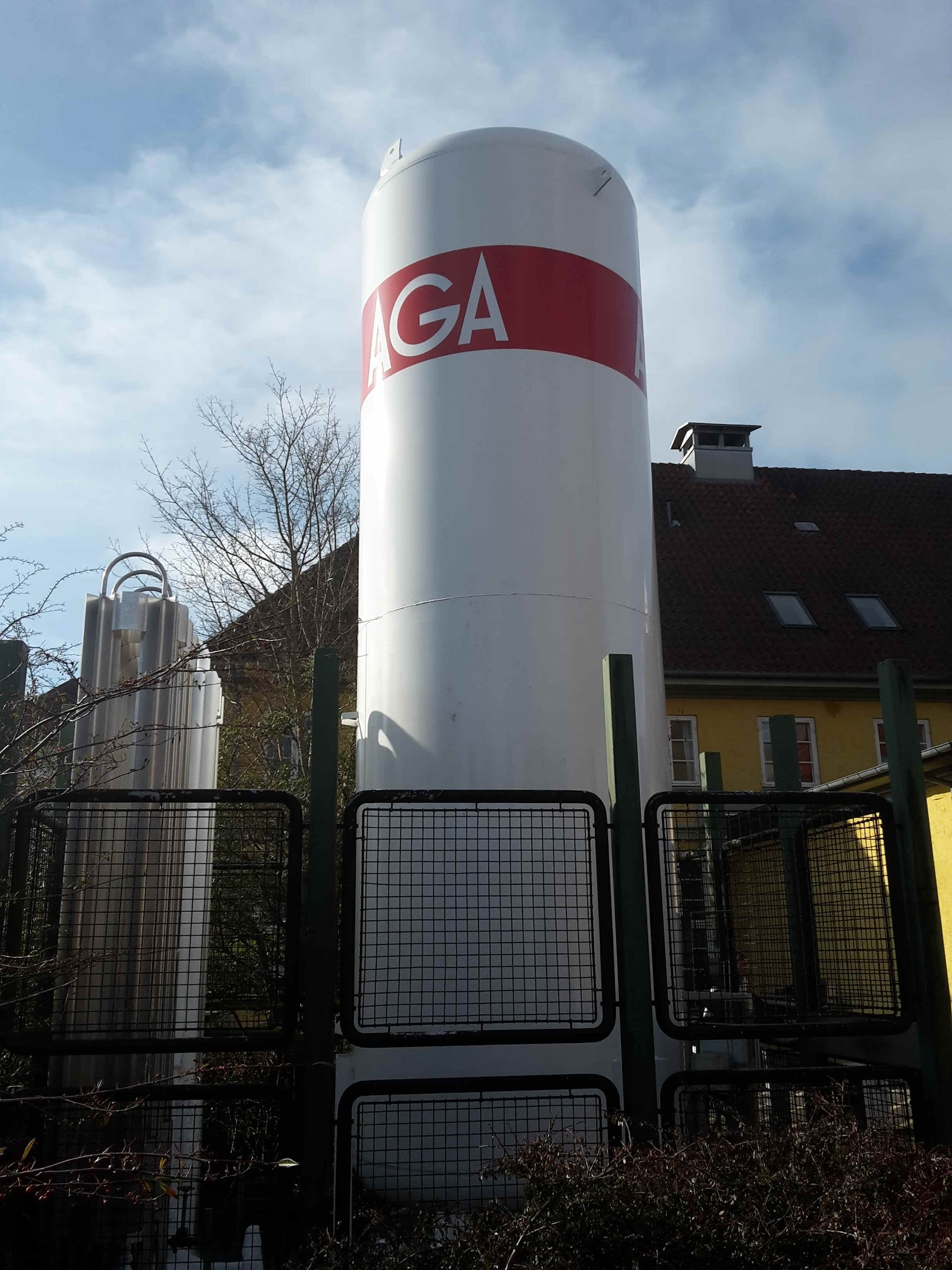 Vacuum insulated evaporator til production at ilt i gas form fra det flydende.